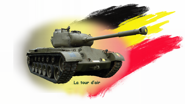 L'esplanade des blindés sur laquelle se trouvent de nombreux chars